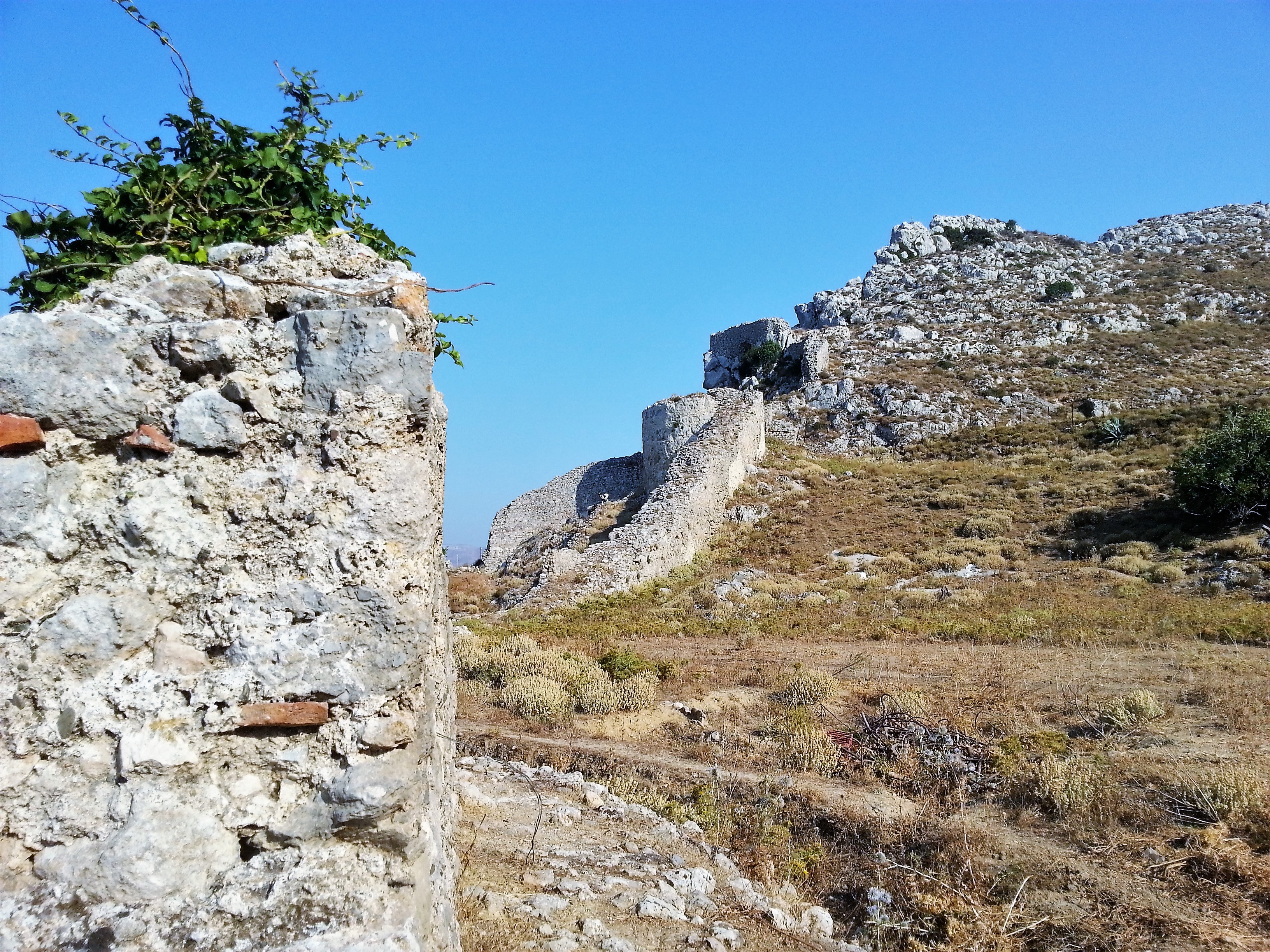 «Φρούριον Τεμένους»